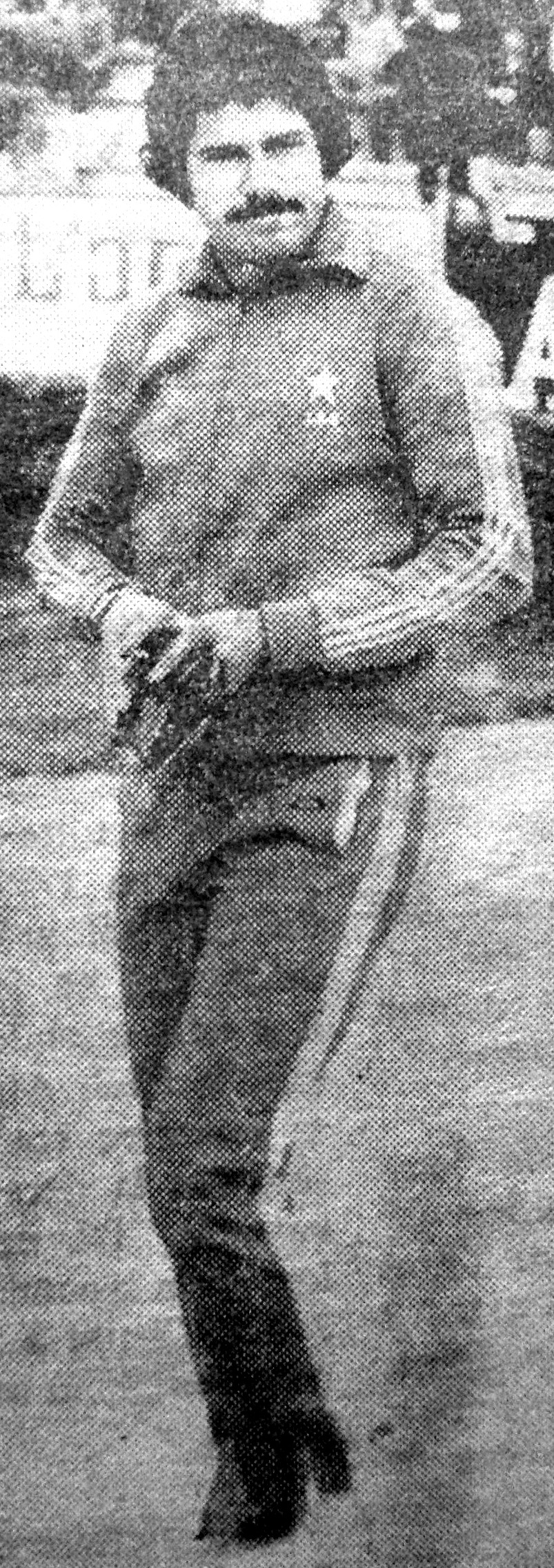 Abdelmajid Chetali, entraîneur de l'Étoile du Sahel en 1973